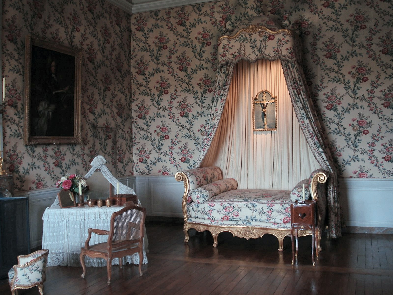 Schloss Vaux-le-Vicomte, Innenansicht